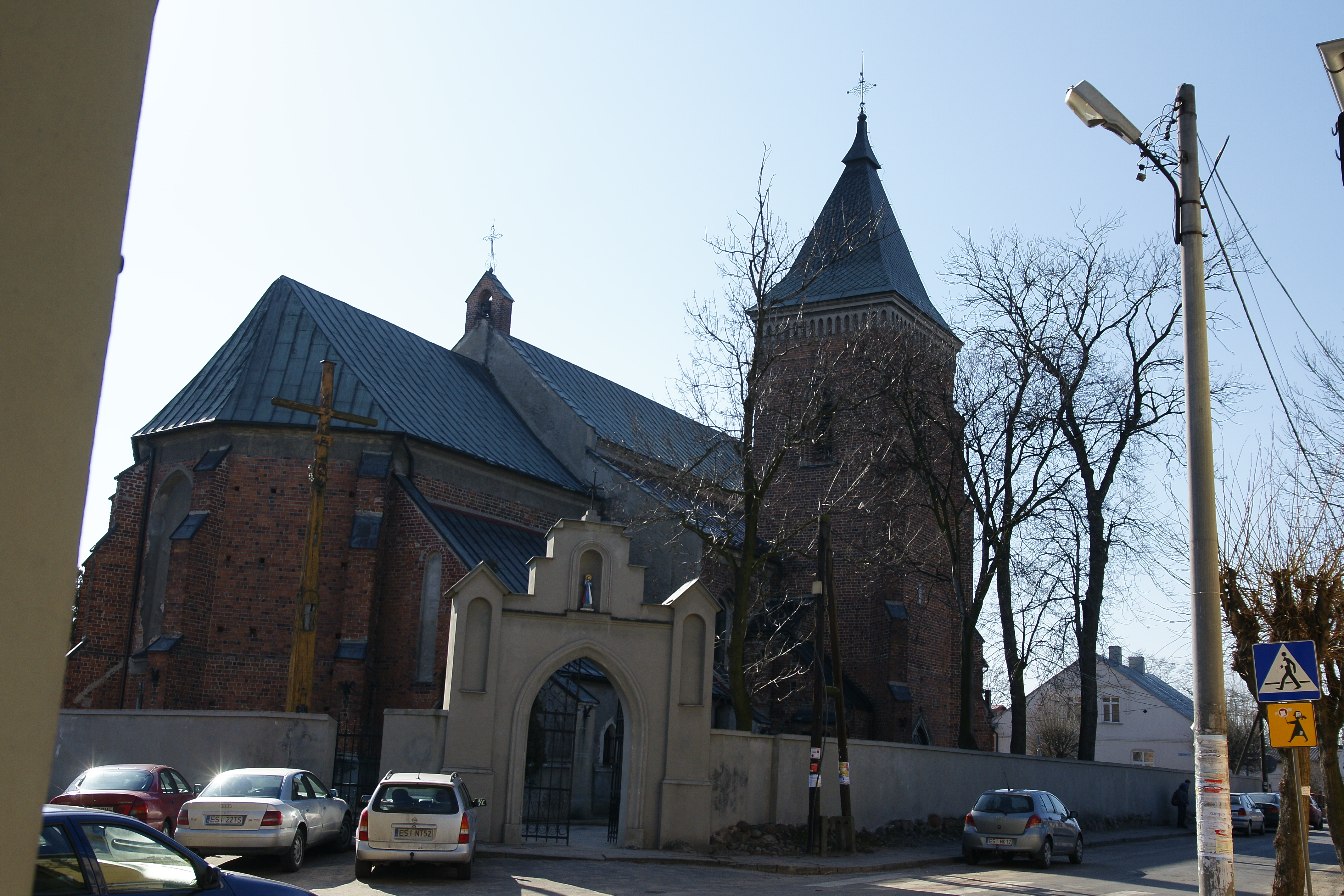 Kościół pw św Mikołaja w Warcie